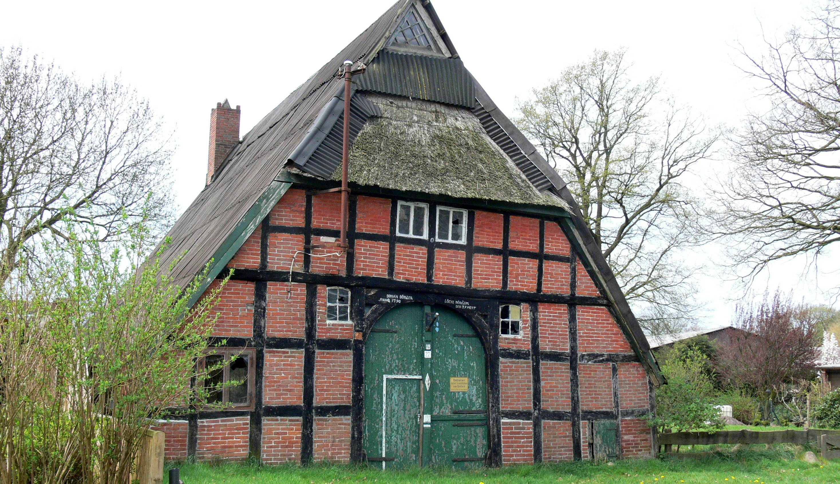 Fachwerkhaus Dorfstr. 22 in Westerbeverstedt (Lunestedt); inzwischen abgerissen